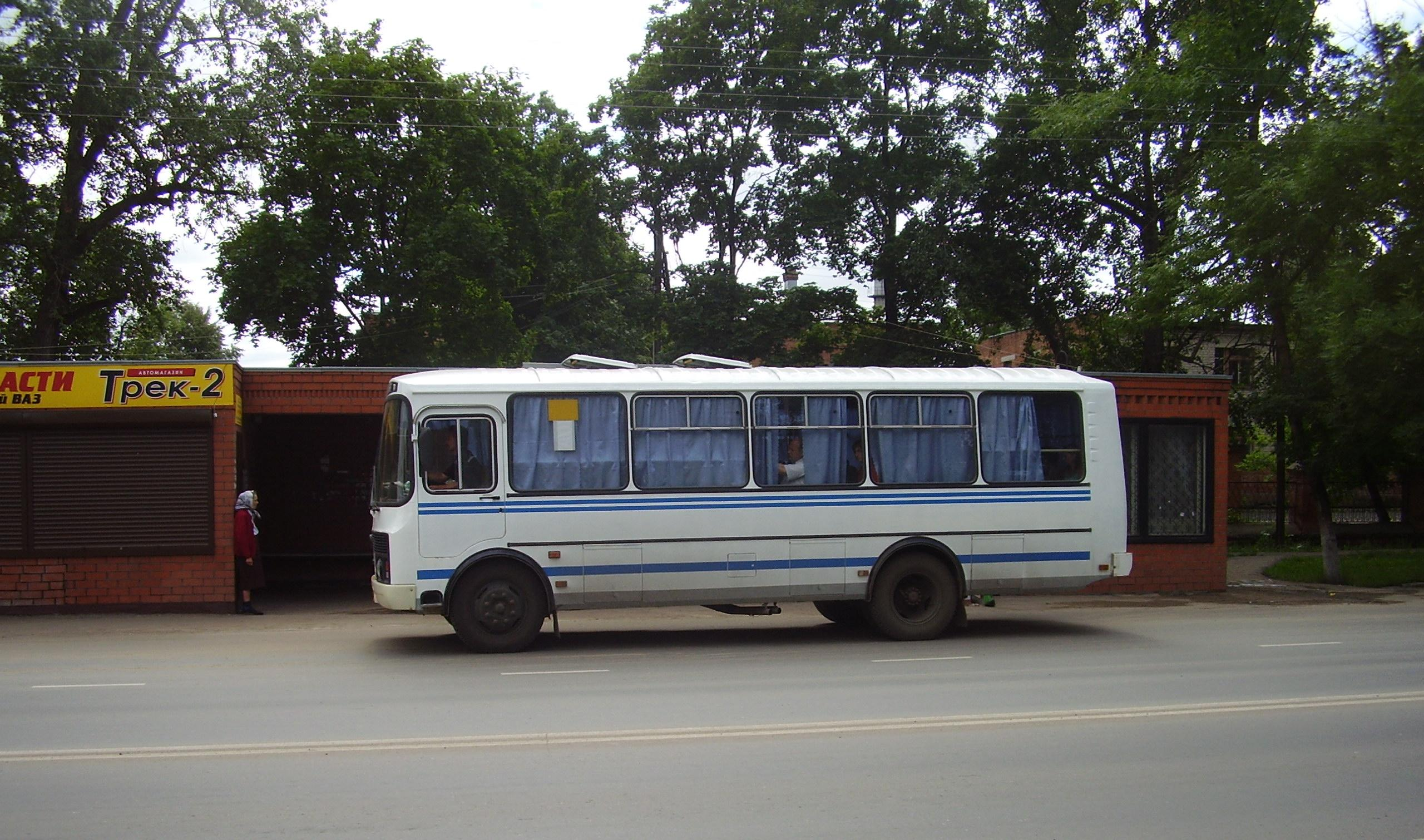 Автобус ПАЗ-4234_в_Мичуринске